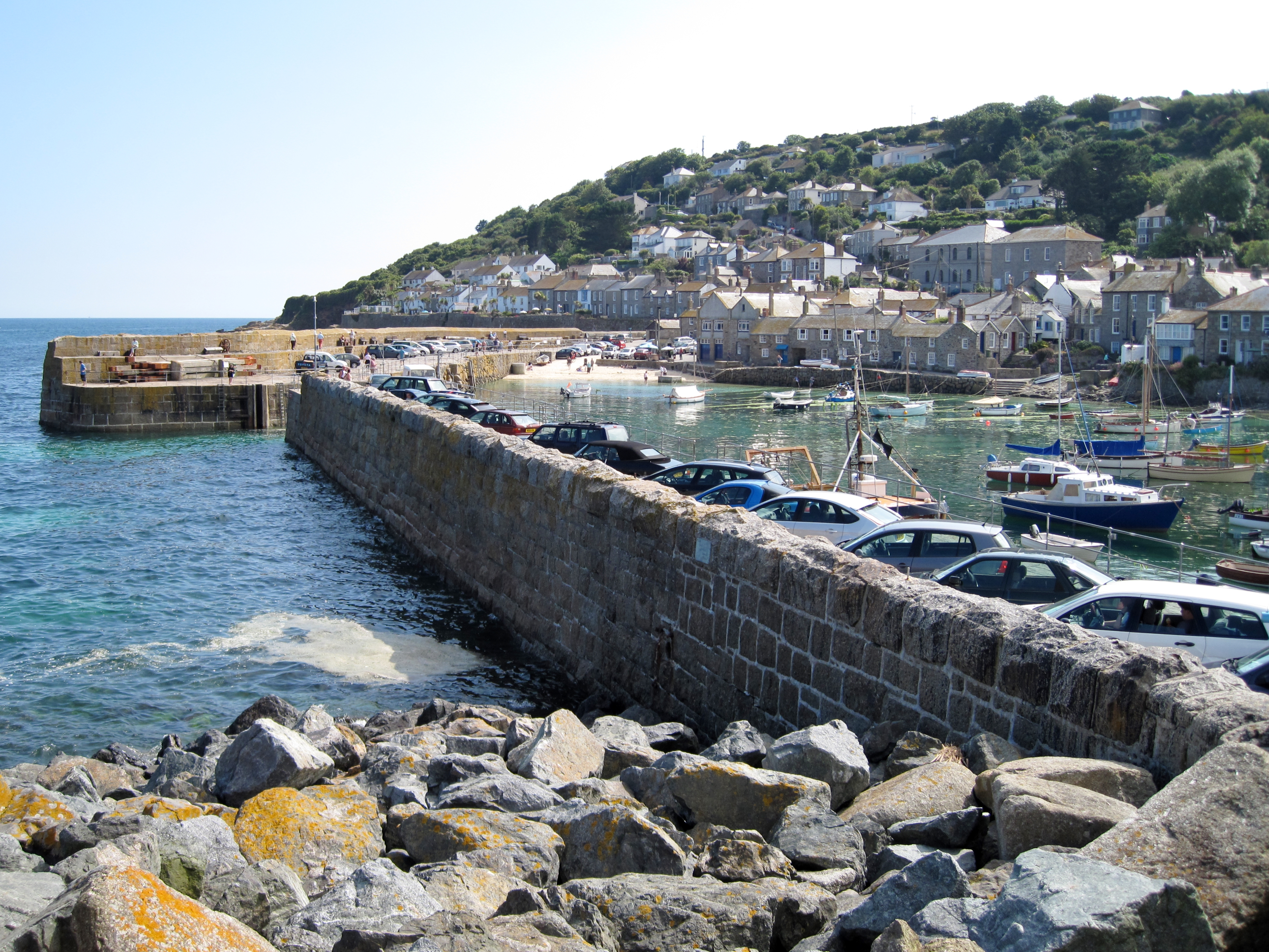 Hafen von Mousehole an der Südküste von Cornwall, England